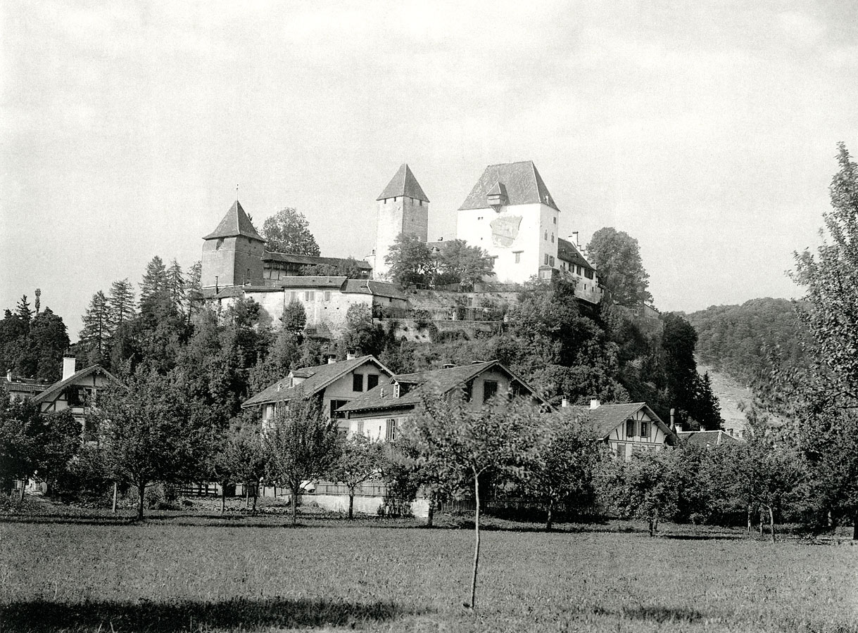 Schloss Burgdorf